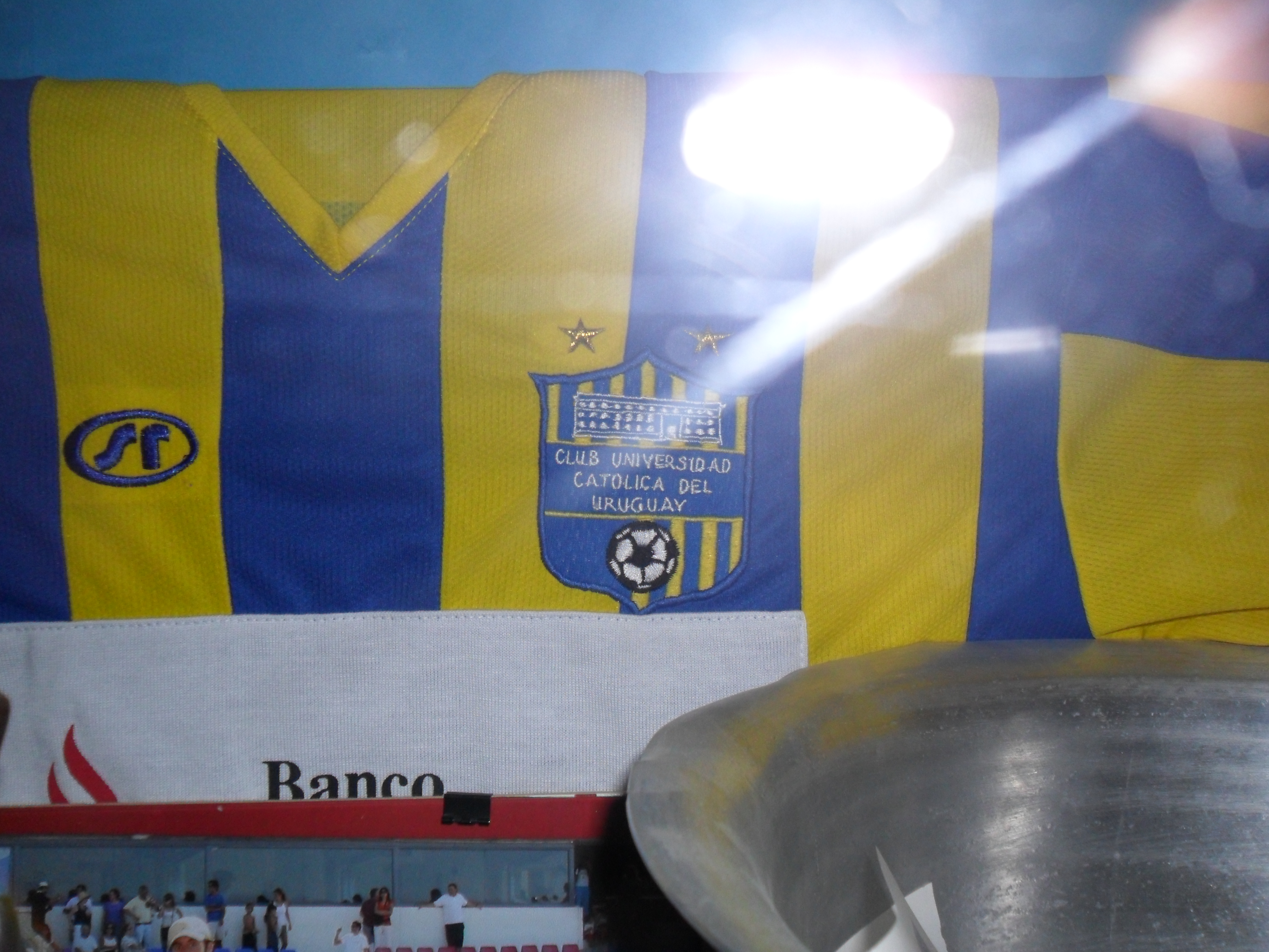 Imagen de la camiseta titular del Club Universidad Católica, equipo representativo de la universidad a nivel deportivo.